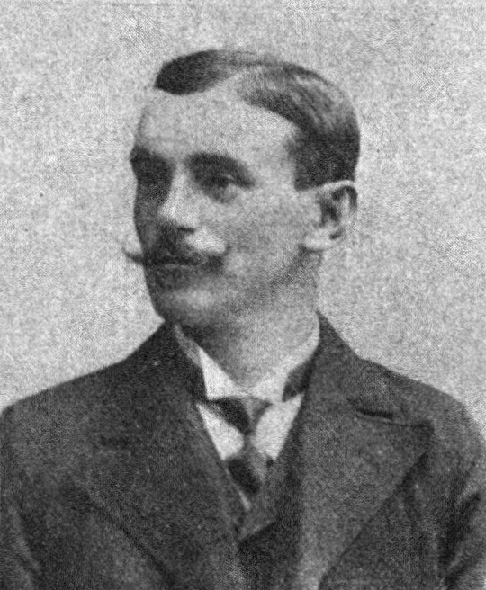 Österreichischer Politiker, Reichsratswahl 1907, Name siehe Dateiname